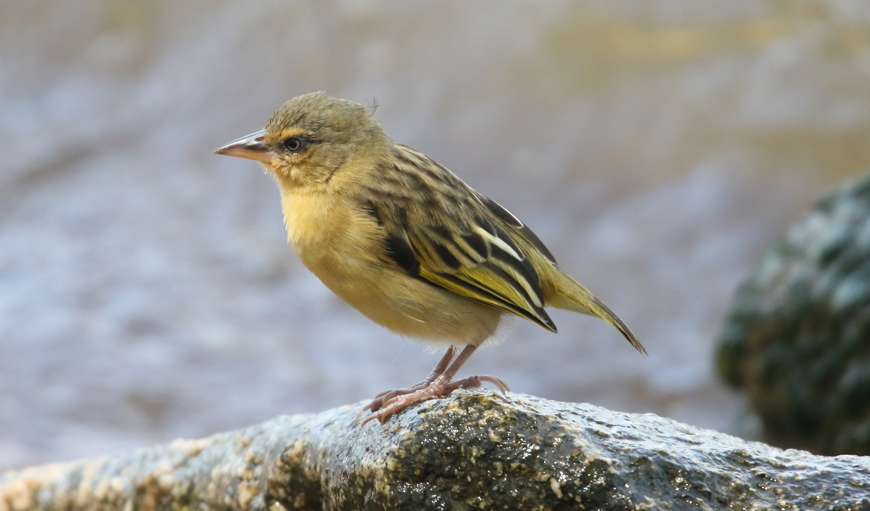 Female